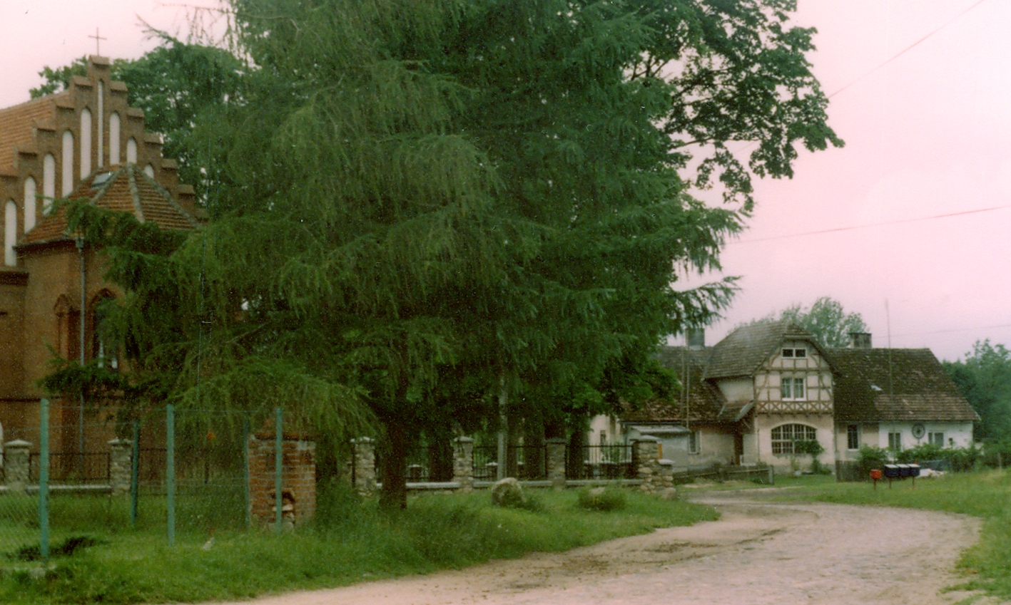 Wrzeście